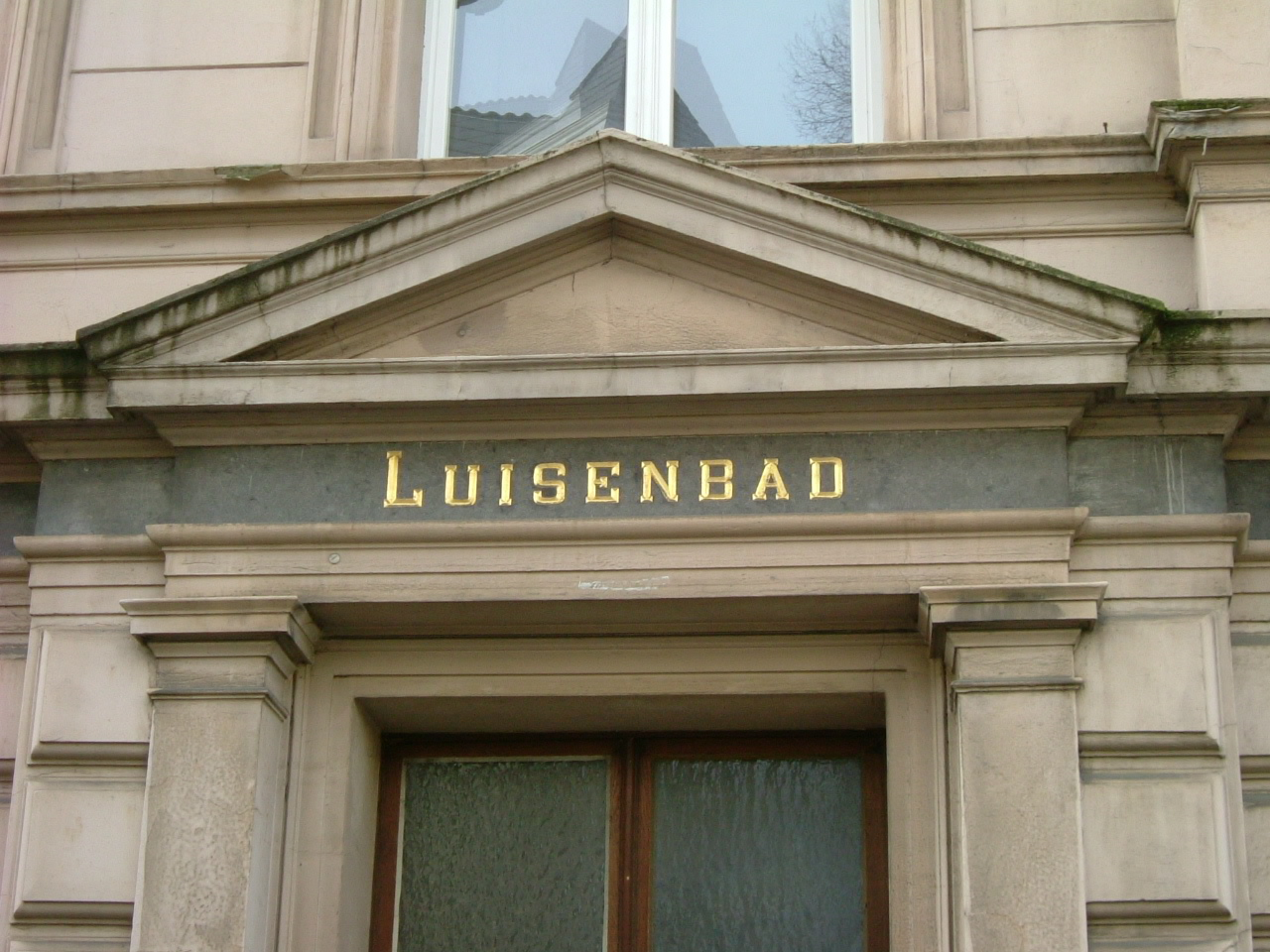 Fassade des ehemaligen Luisenbades /Frankenberger Viertel, Aachen